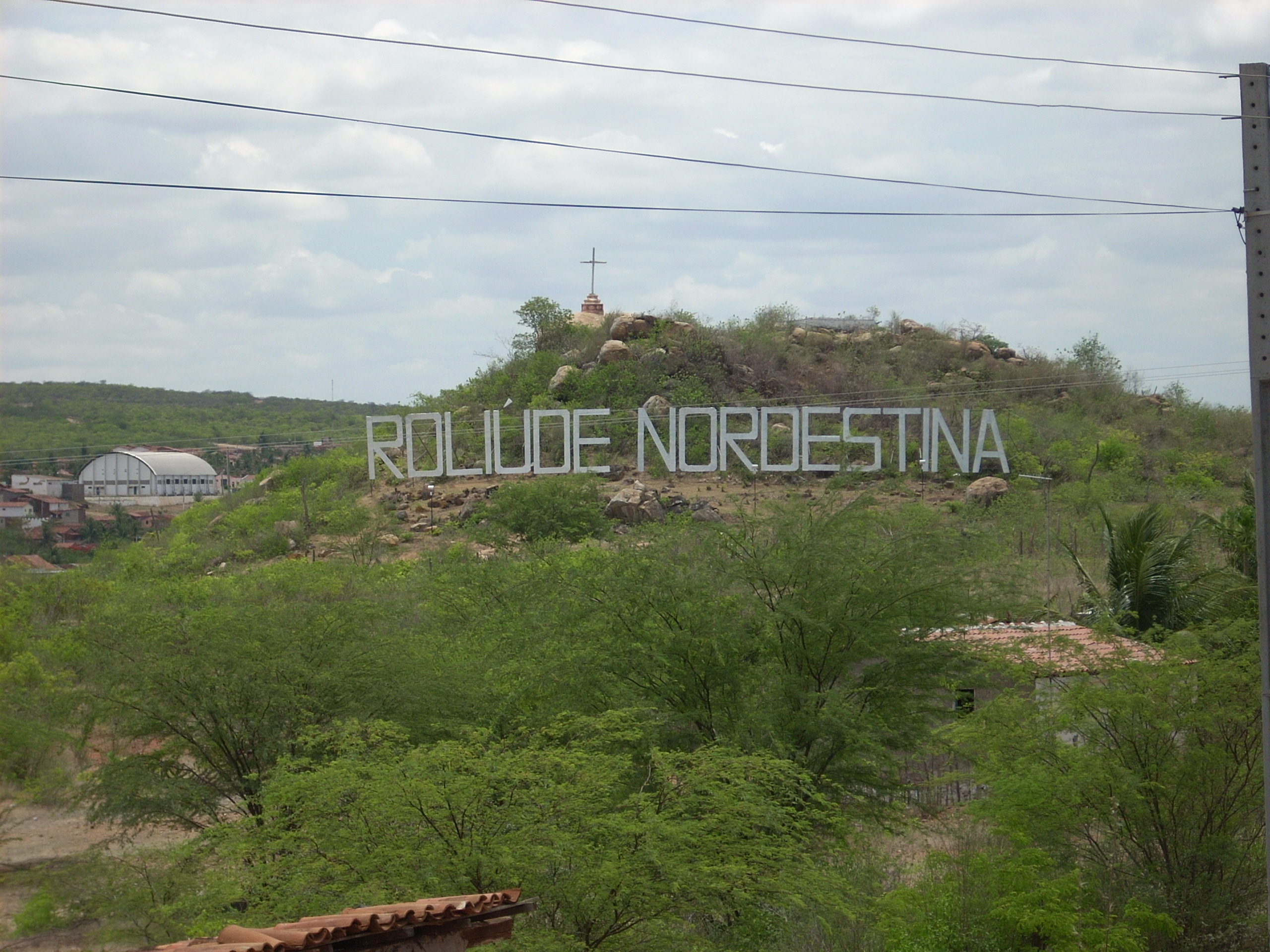 Letreiro Roliúde Nordestina em Cabaceiras (PB)